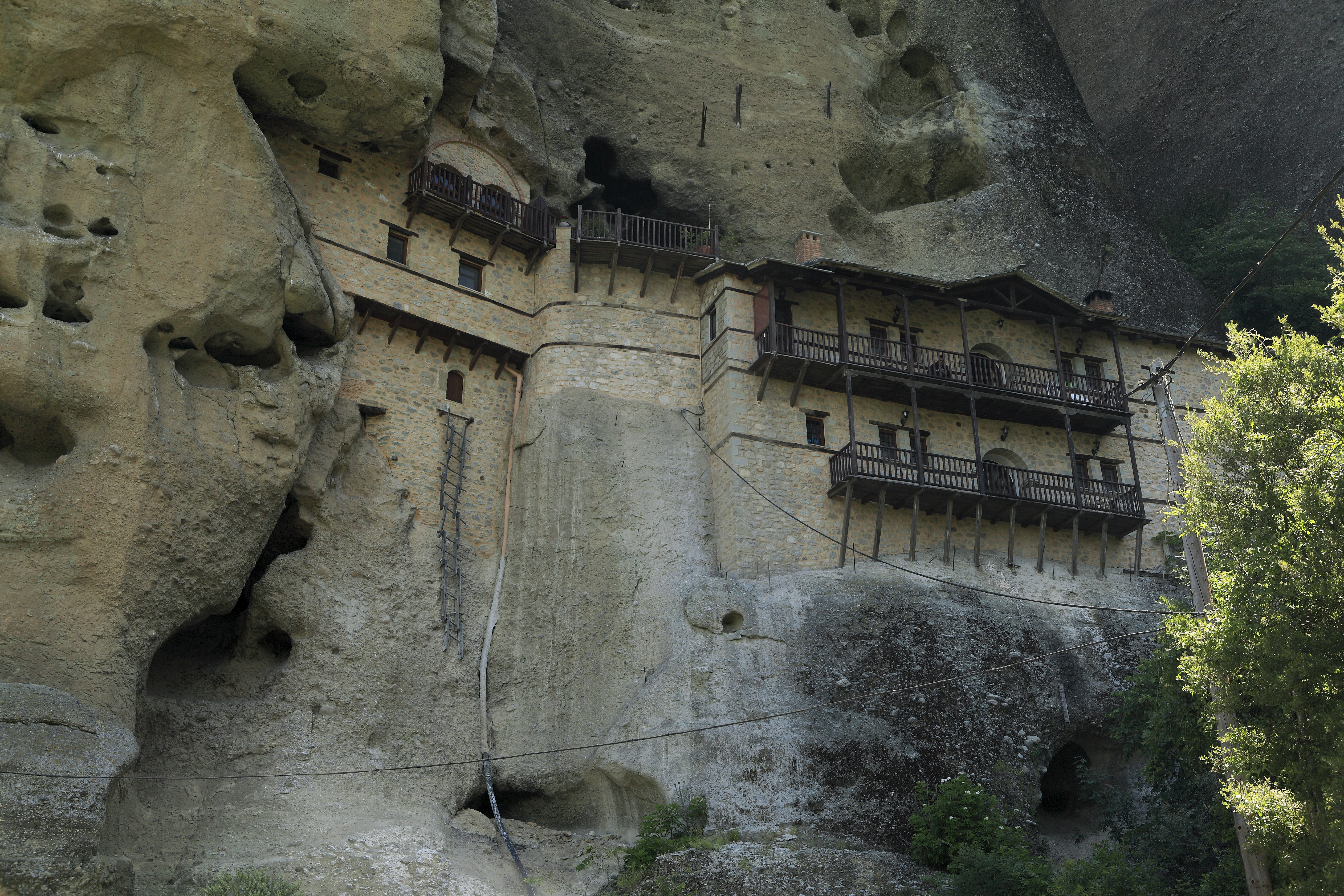 Vom Fuß der Südwestwand des Pixaristeins, das Kloster ist nach dem Schild an der einfahrt eine Filiale des Klosters Ágia Tríada. Die Holzleiter links ist nicht der Zugang.